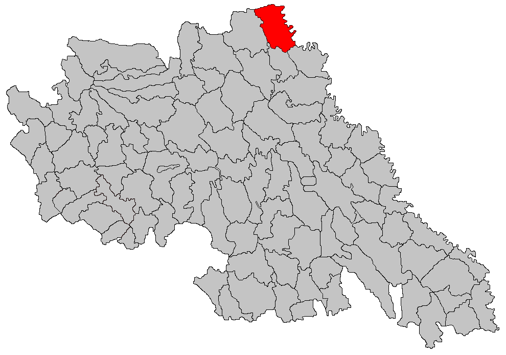 Categorie:Hărţi ale judeţului Iaşi